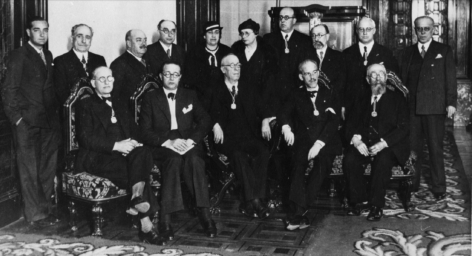 Recepción de Castelao na Real Academia Galega na Coruña o 25 de xullo de 1934. De pé, de esquerda a dereita: Sebastián González, Eladio Rodríguez González, Enrique Peinador Lines, Gonzalo López Abente, Pura González Varela, Celia Brañas Fernández, Ramón Otero Pedrayo, David Fernández Diéguez, Ángel del Castillo López e Fernando Cortes Bugía. Sentados: Fernando Martínez Morás, Castelao, Manuel Lugrís Freire, Antón Villar Ponte e Félix Estrada Catoyra.